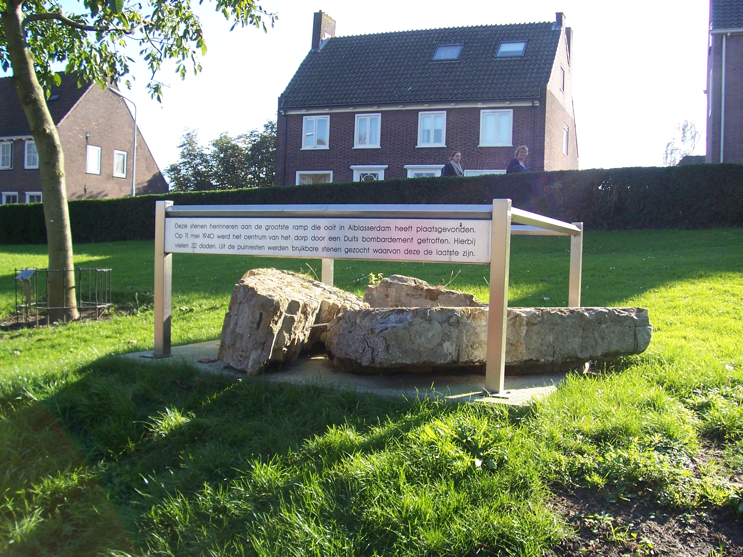 Delen van de sluismuur van een bombardement uit de Tweede Wereldoorlog, waarbij 28 doden vielen, op 11 mei 1940. Op de plaat bij de stenen staat 32 doden, aangezien 4 andere mensen zwaargewond waren en een tijdje later alsnog door het letsel overleden zijn.